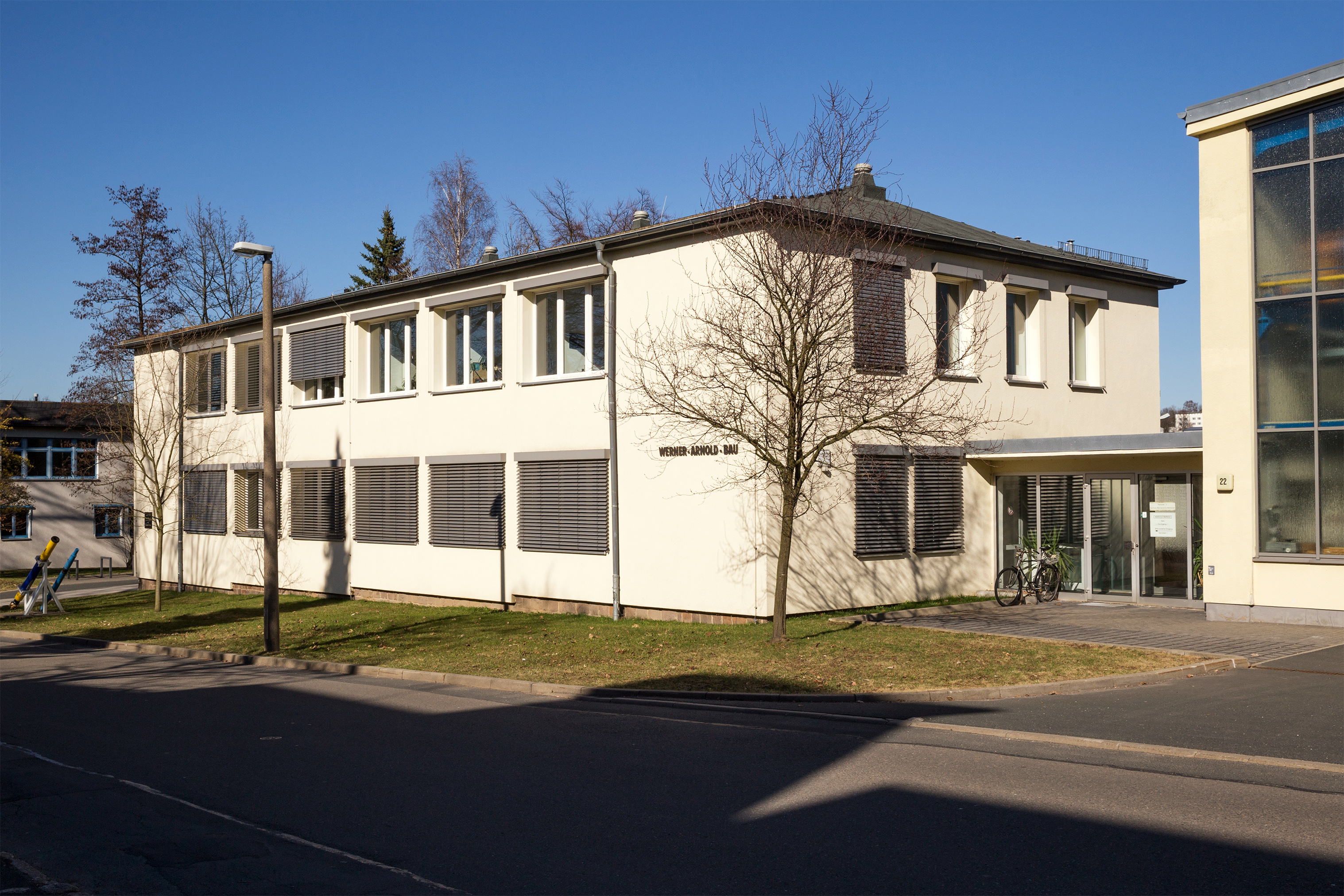 Freiberg, TU Bergakademie Freiberg, Werner-Arnold-Bau, Agricola-Straße 22